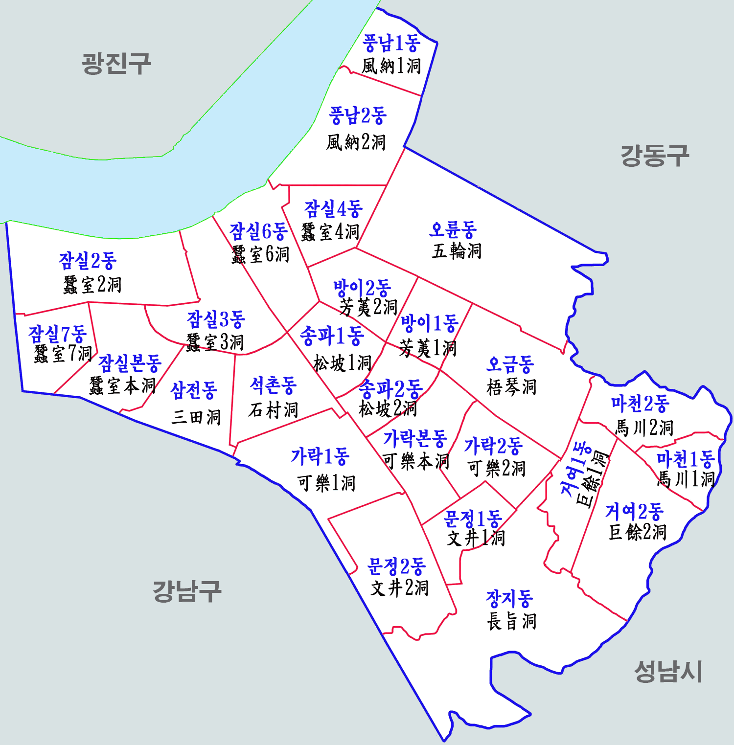 서울시 송파구 행정구역도